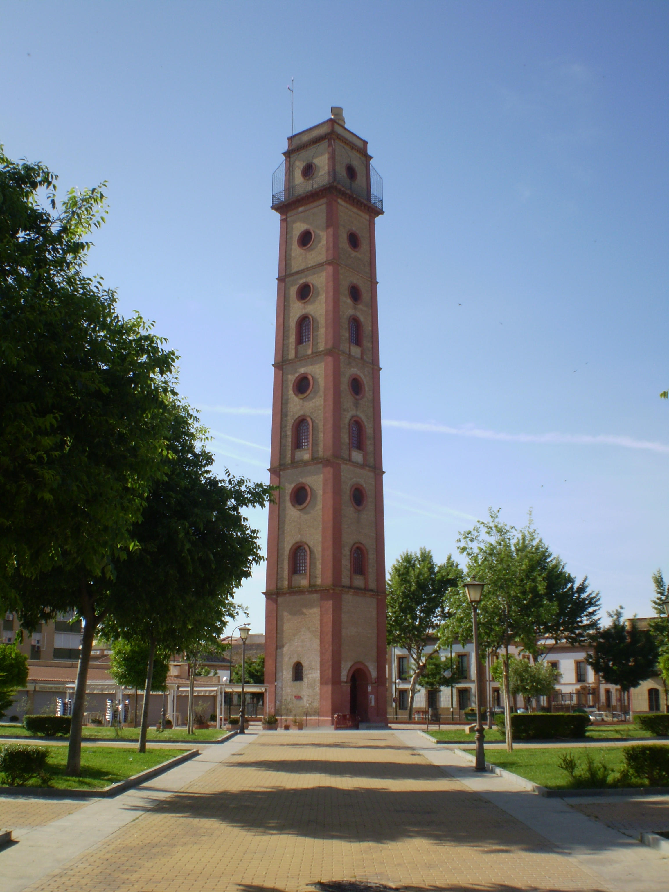 Tour à plomb de Séville, construite en 1890. seul vestige de la fabrique San Fransisco de Paula détruite dans les années 1950.